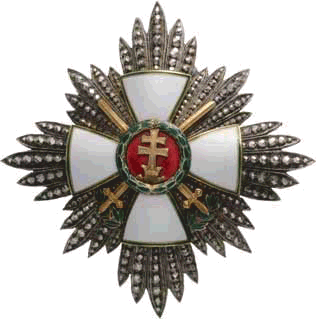 Magyar Érdemkereszt hadidíszítményes középkeresztje a csillaggal